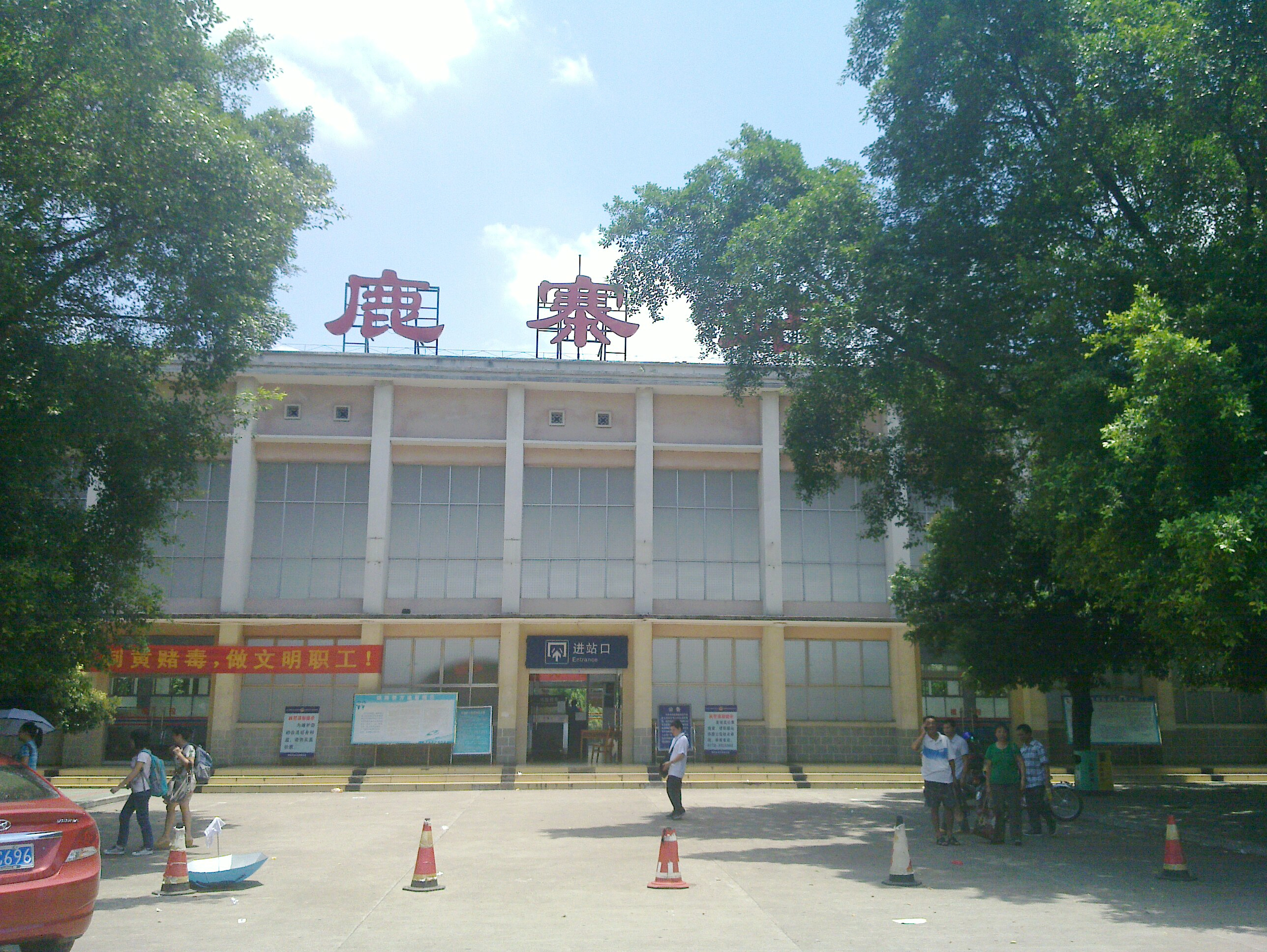 鹿寨火车站站楼